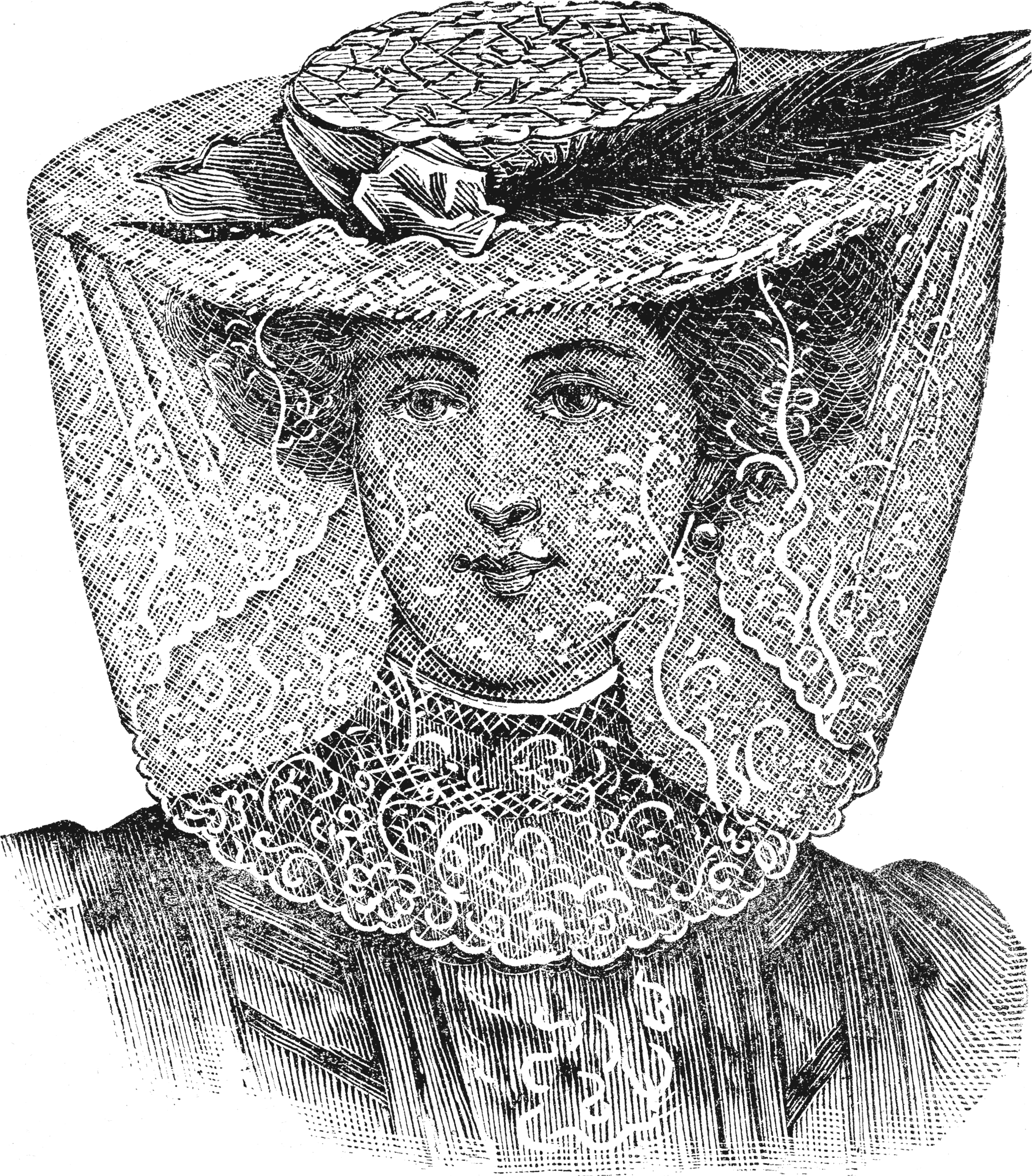 VOILETTE tulle crème brodé. Longueur 1m25, largeur 0m40. La voilette 1.95